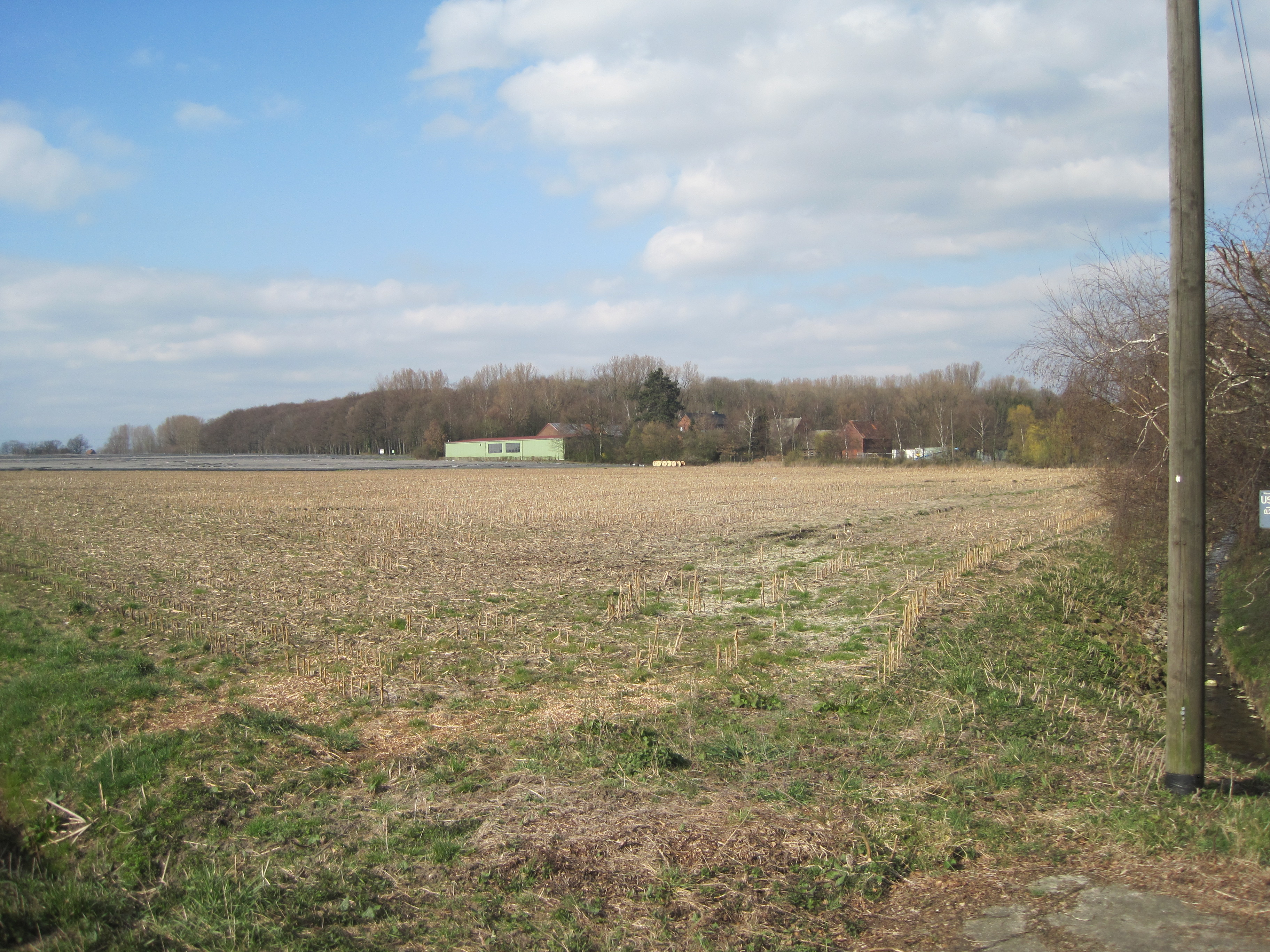 Das Foto zeigt das Feld, auf dem die 1855 abgebrochene Wasserburg "Haus Beckedorf" stand. Die Gräfte und Teile des Mauerwerks befanden sich hier noch bis ca. 1965 und stand unter hohen Kastanien, dann wurden sie im Zuge der Flurbereinigung entfernt. Das Gelände liegt an der Herberner Straße in Werne-Horst.